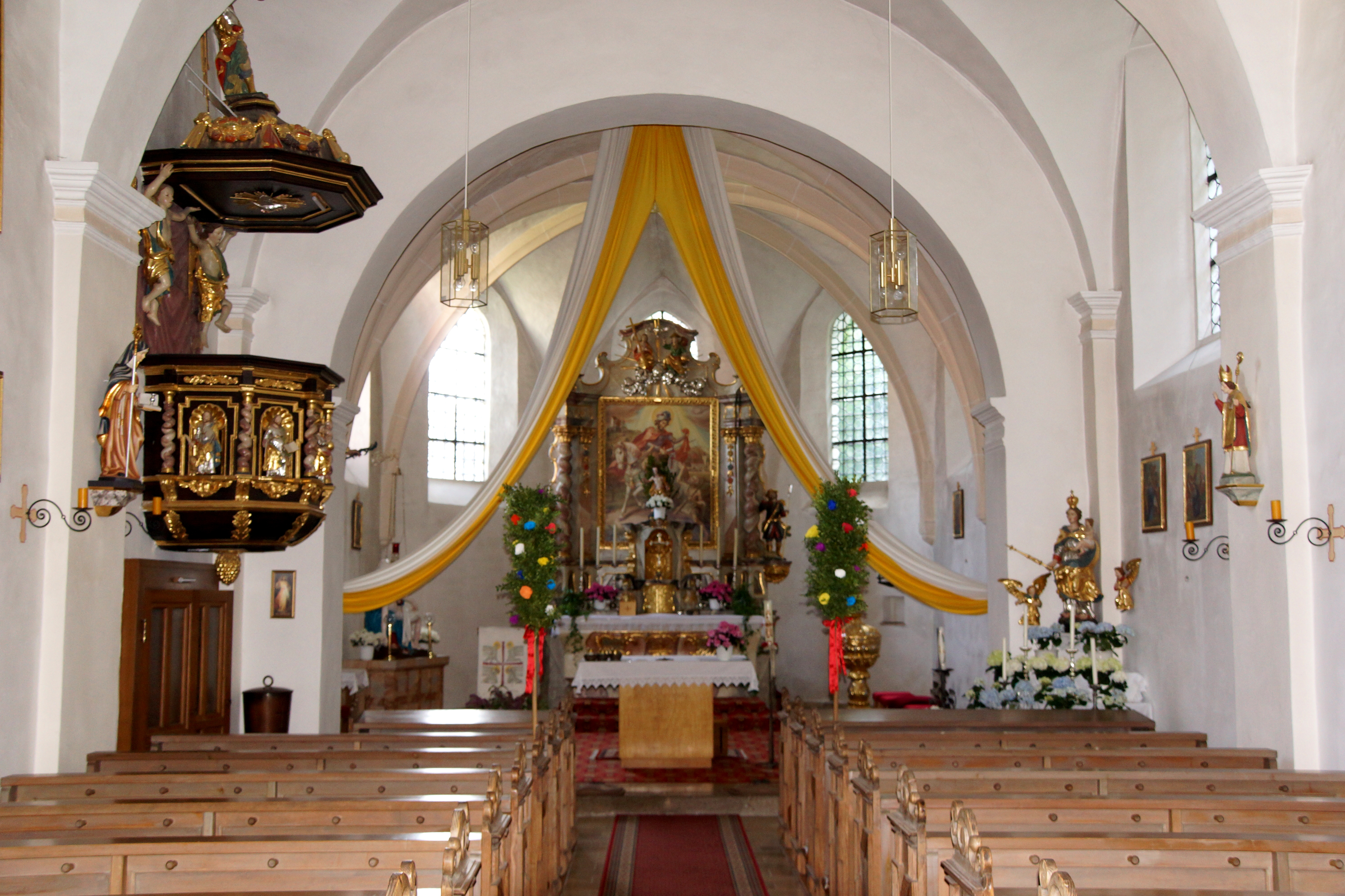 Die katholische Kuratiekirche St. Marin in Pfaffenhofen im Oberpfälzer Lauterachtal